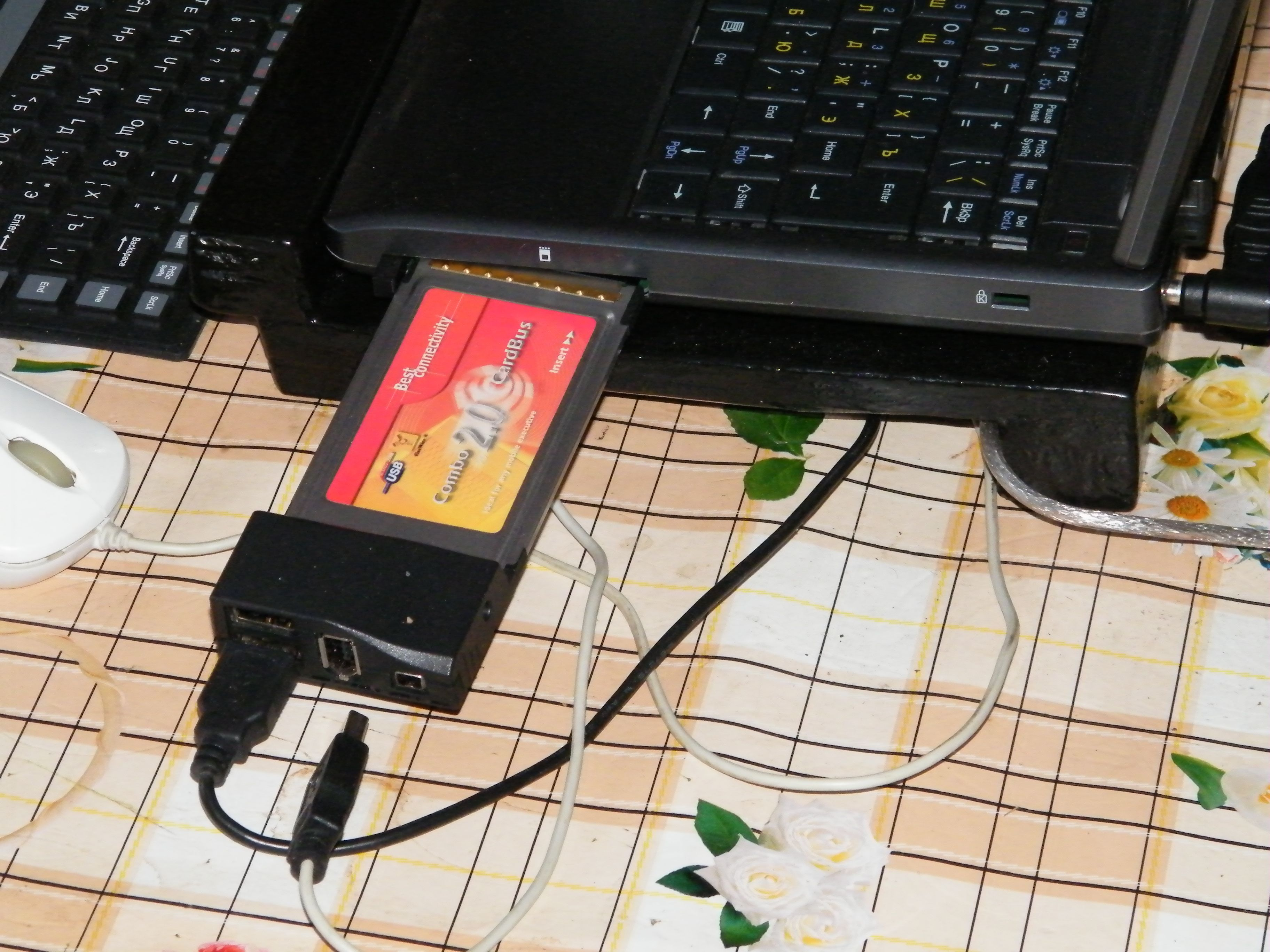 CardBus с двумя разъемами USB и двумя разъемами FireWire